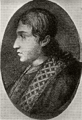 Ercole Strozzi, da M. Catalano, Vita di Ludovico Ariosto ricostruita su nuovi documenti, vol. I, Genève, L. Olschki, 1930-1931, p. 245